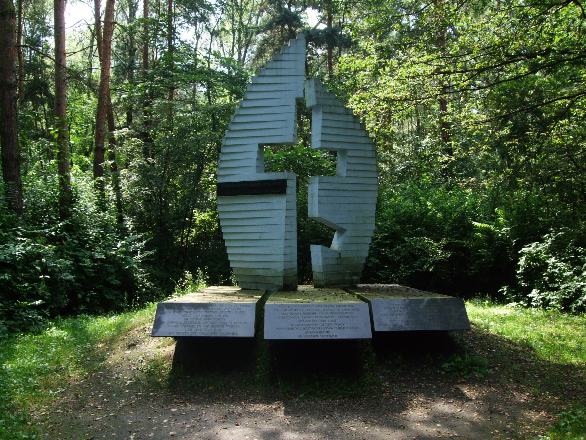 Pomnik więźniów obozu w Jaworznie. Odsłonięty 23 maja 1998 roku przez Prezydenta RP Aleksandra Kwaśniewskiego i Prezydenta Ukrainy Leonida Kuczmę.